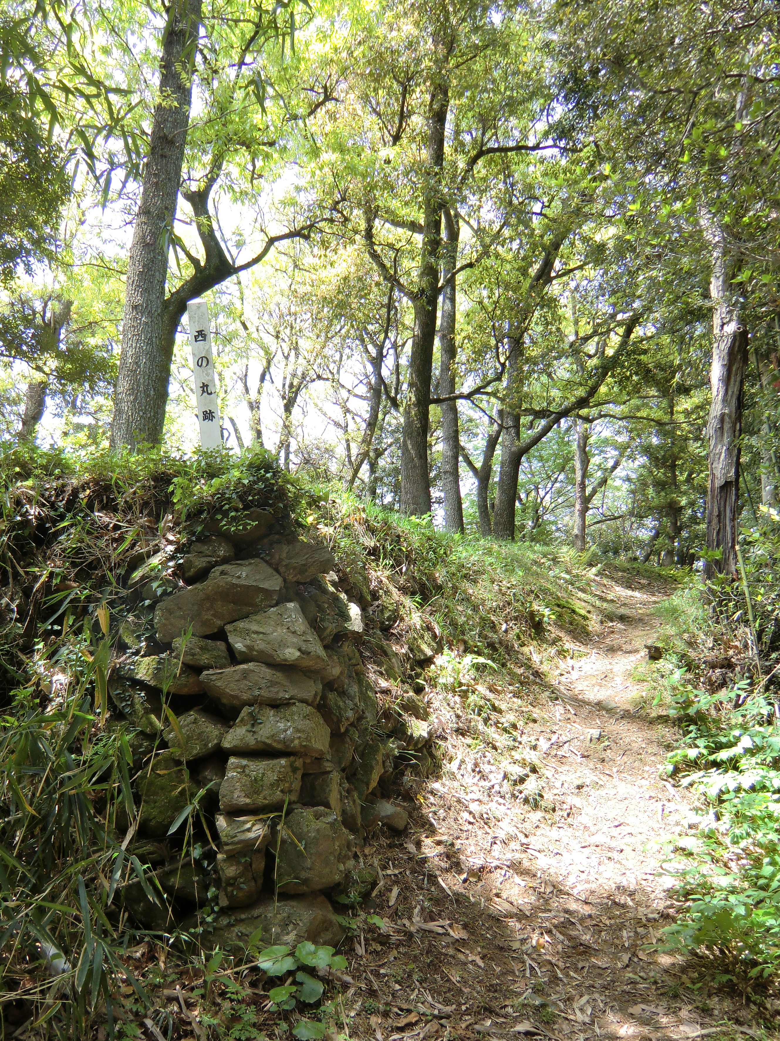 若山城跡の西の丸に残る石垣